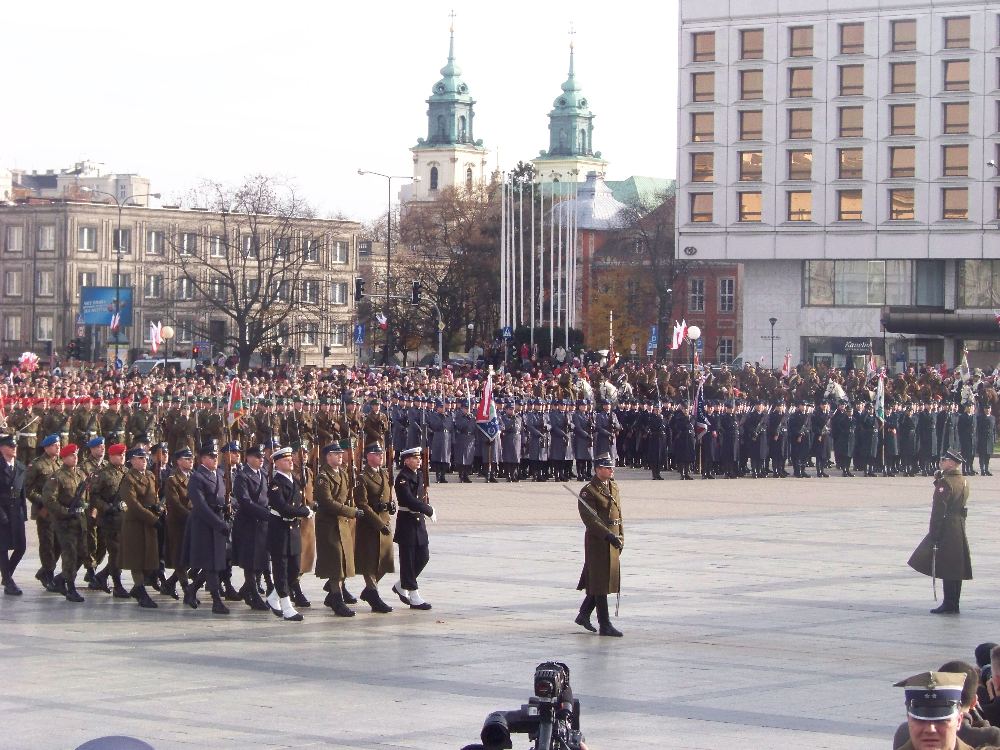 Święto Niepodległości